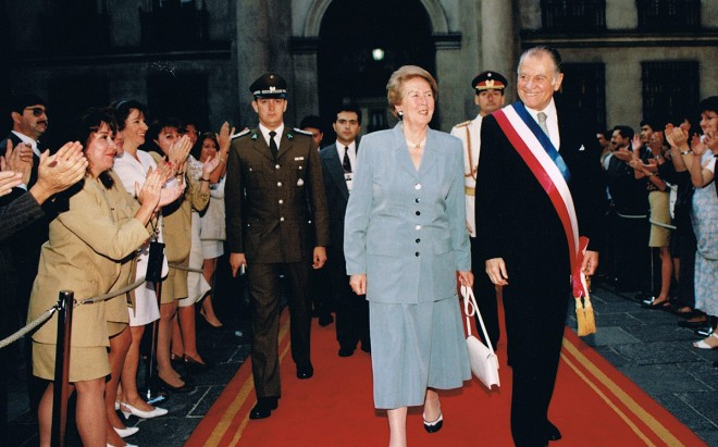 Patricio Aylwin junto a su esposa Leonor Oyarzun en el Palacio de la Moneda .